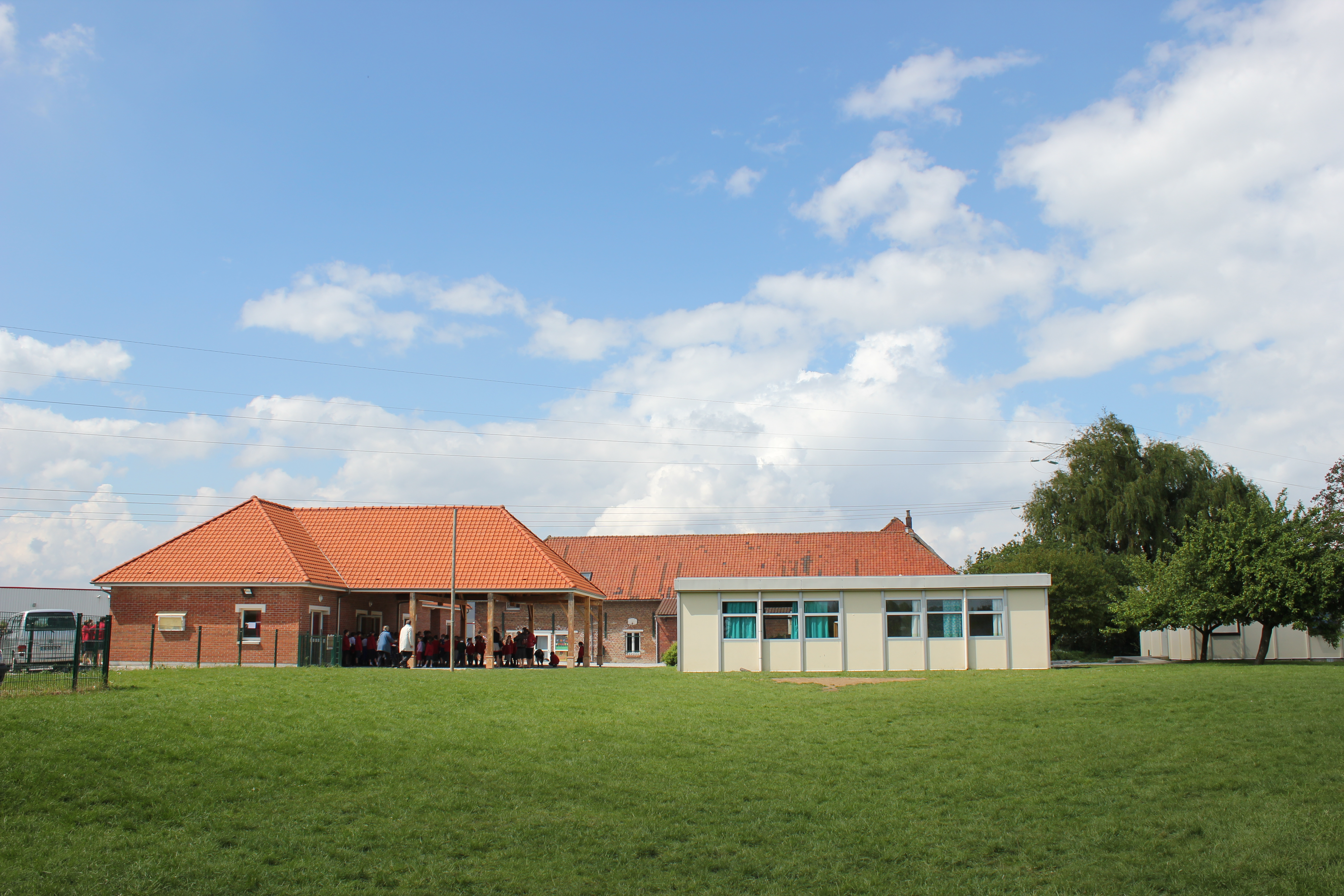 Ecole Notre de Dame de Fatima, la Chapelle d'Armentières